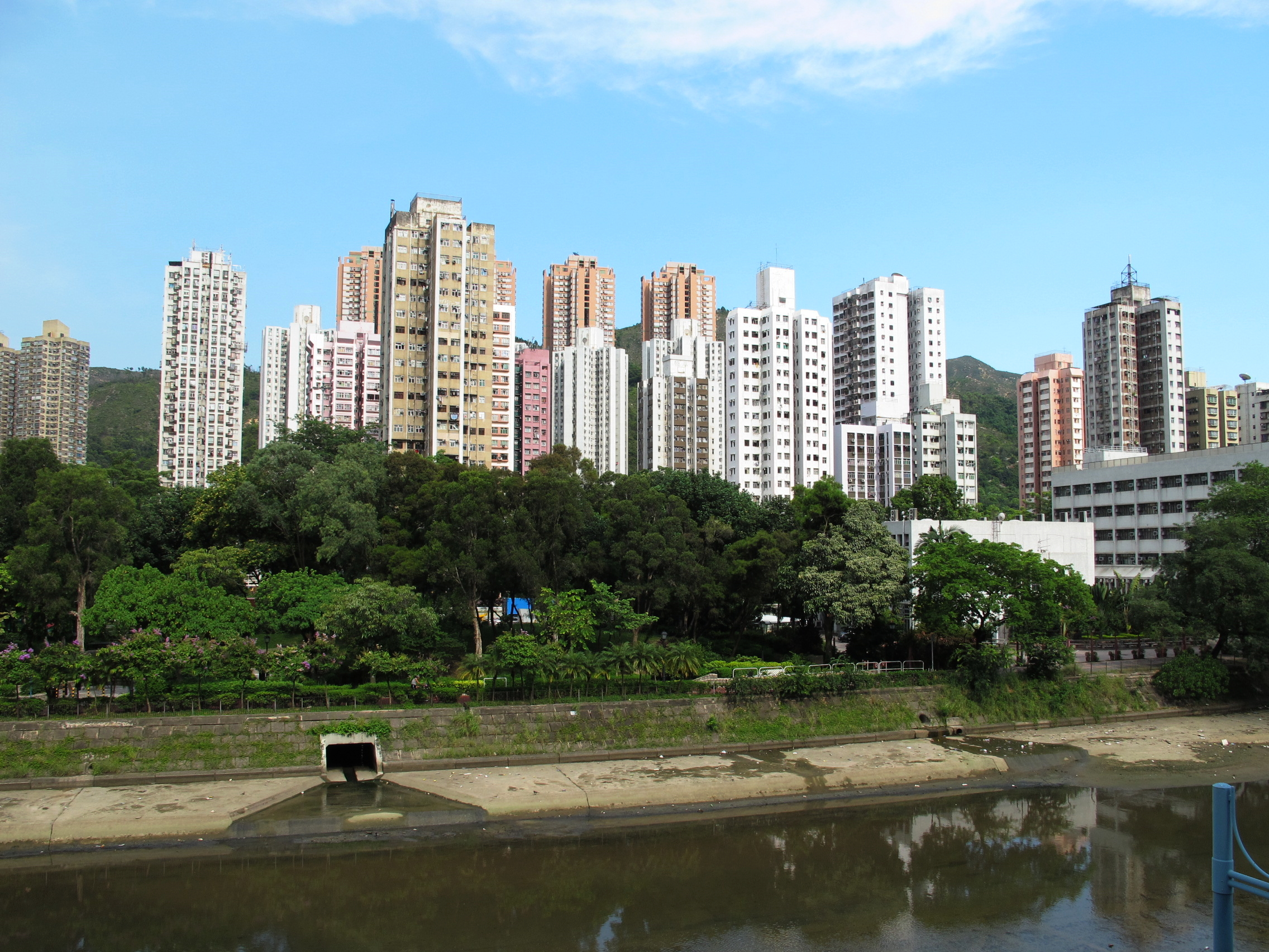 Tuen Mun San Hui 屯門新墟